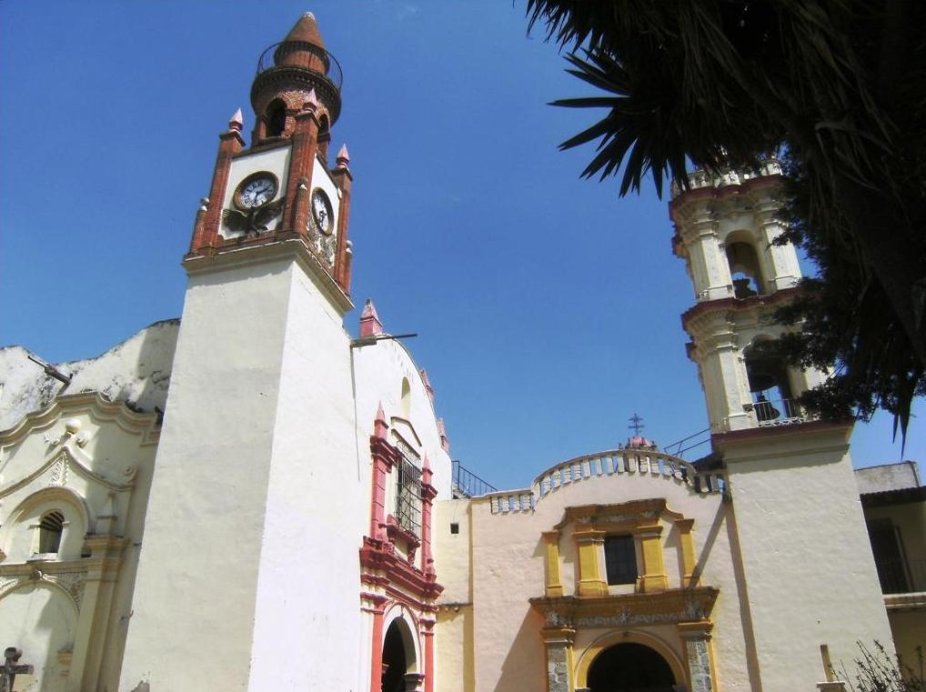 San Pablo Apetatitlán, Tlaxcala